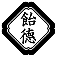 飴徳連合会の代紋.